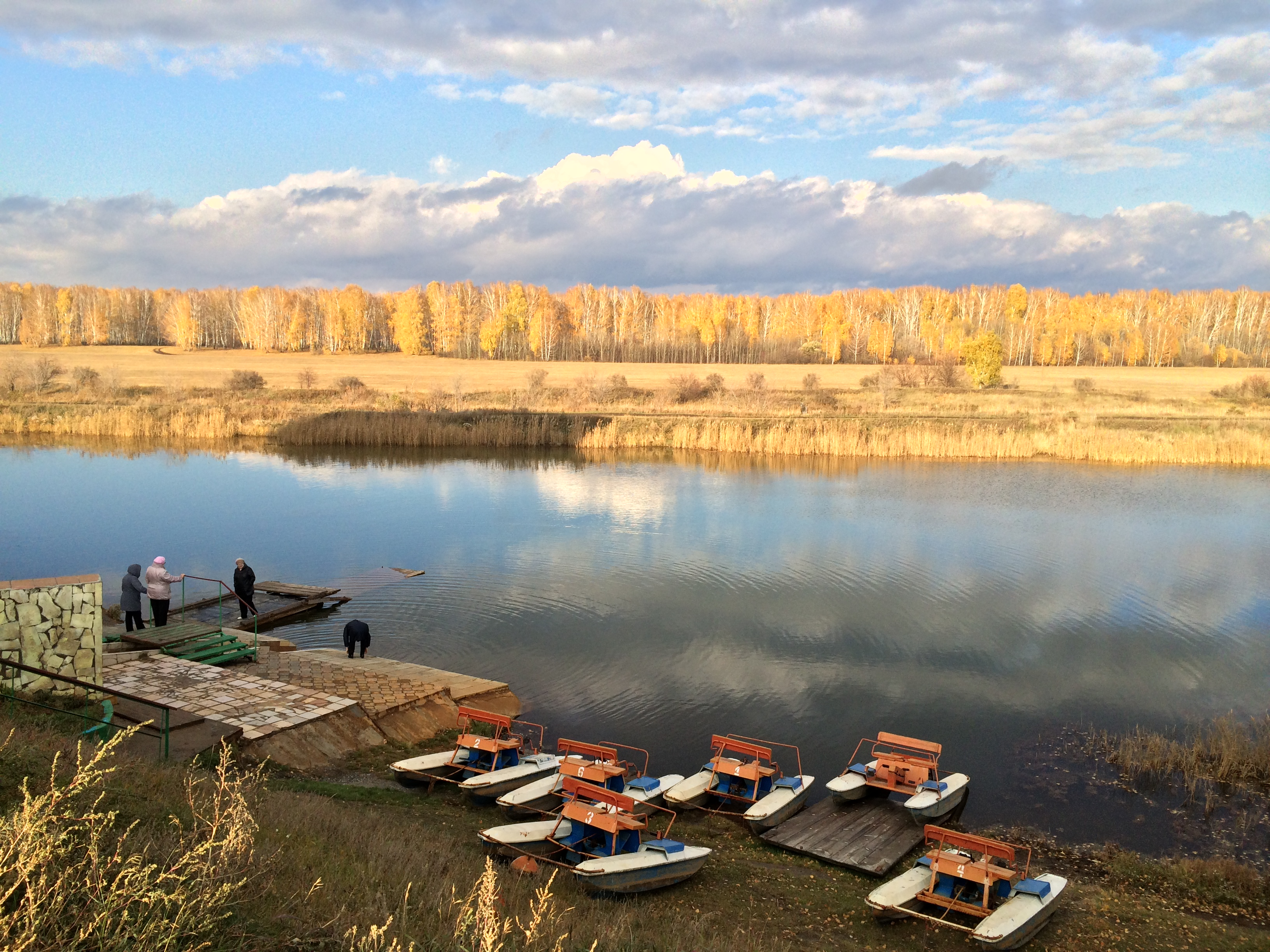 Урочище Политотдел, Любинский район This image is related to the protected area of Russia number 5510045